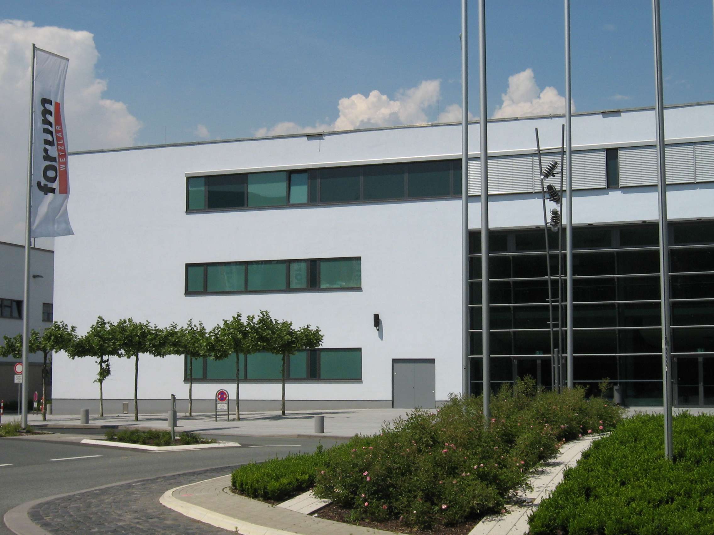 Mittelhessen-Arena in Wetzlar, Germany, events like handball (HSG Wetzlar)